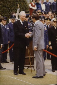 remise de la DSO pour service rendu à l'OTAN.